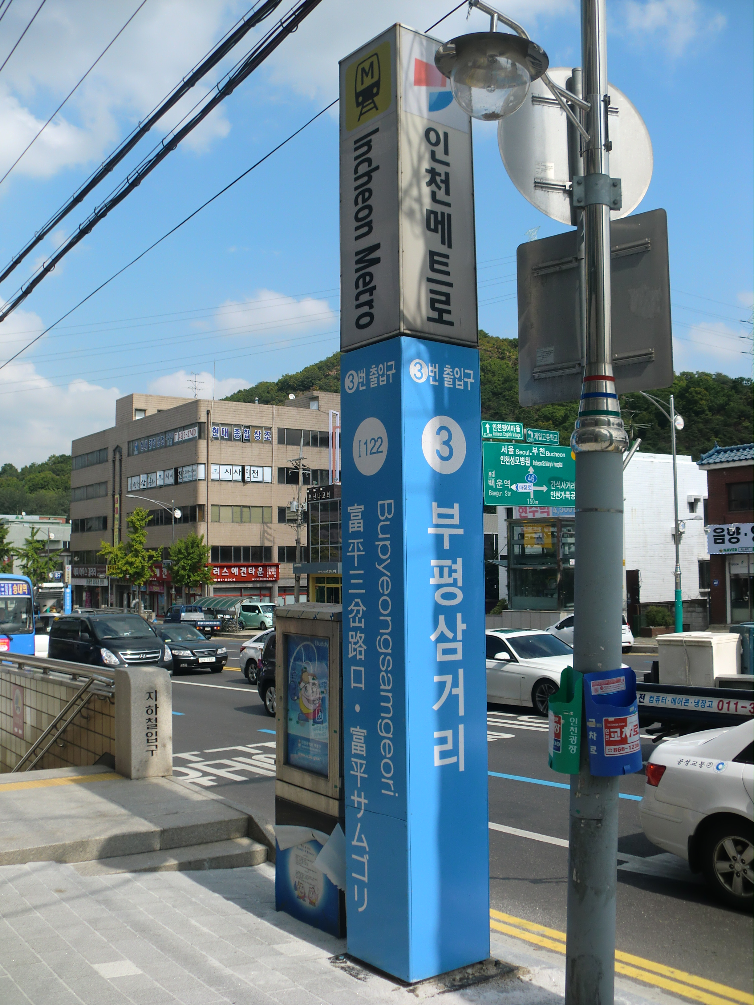 인천메트로1호선 부평삼거리역 3번출구